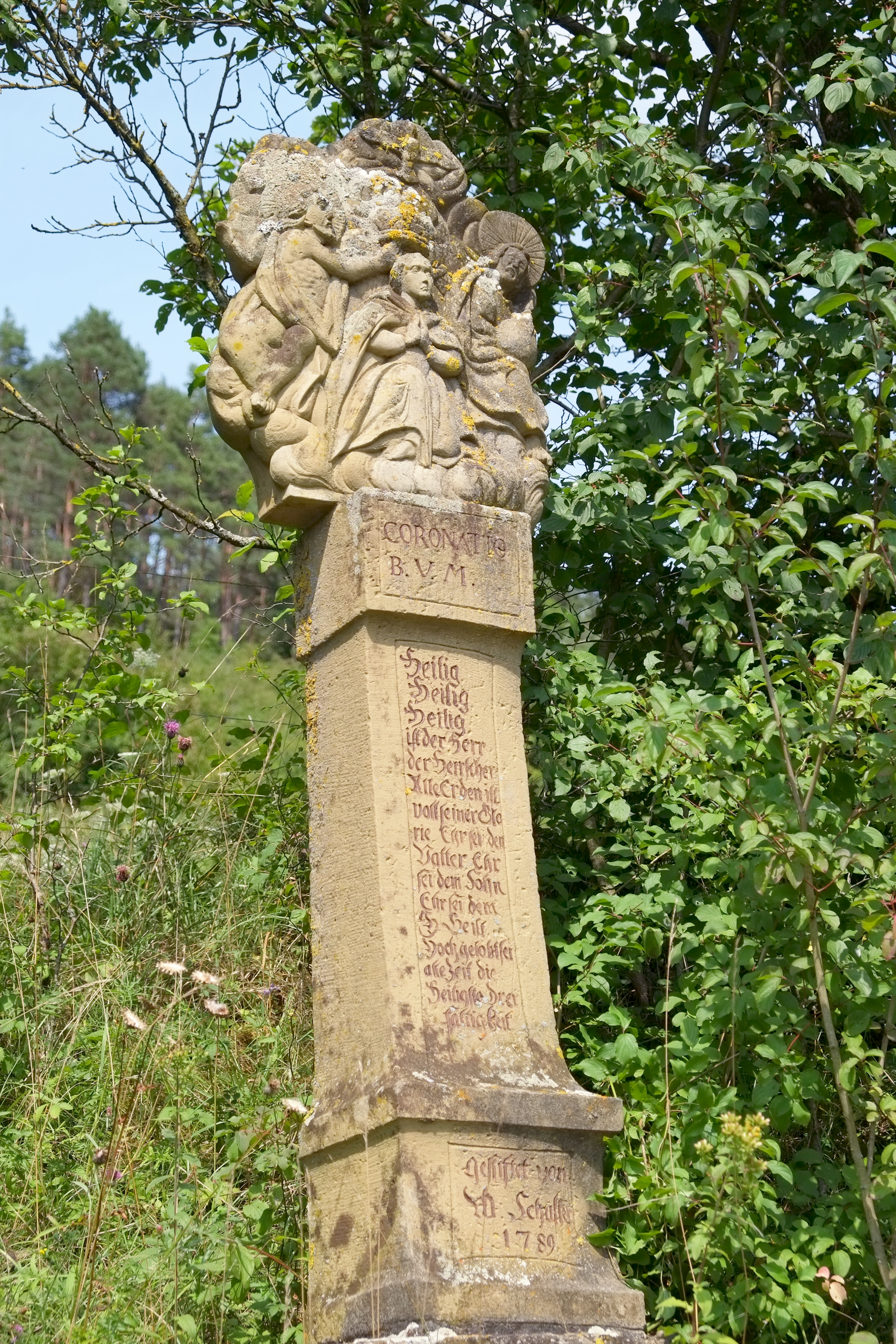 Bildstock bei Eberstal, einem Ortsteil von Ingelfingen im Hohenlohekreis (Baden-Württemberg, Deutschland)